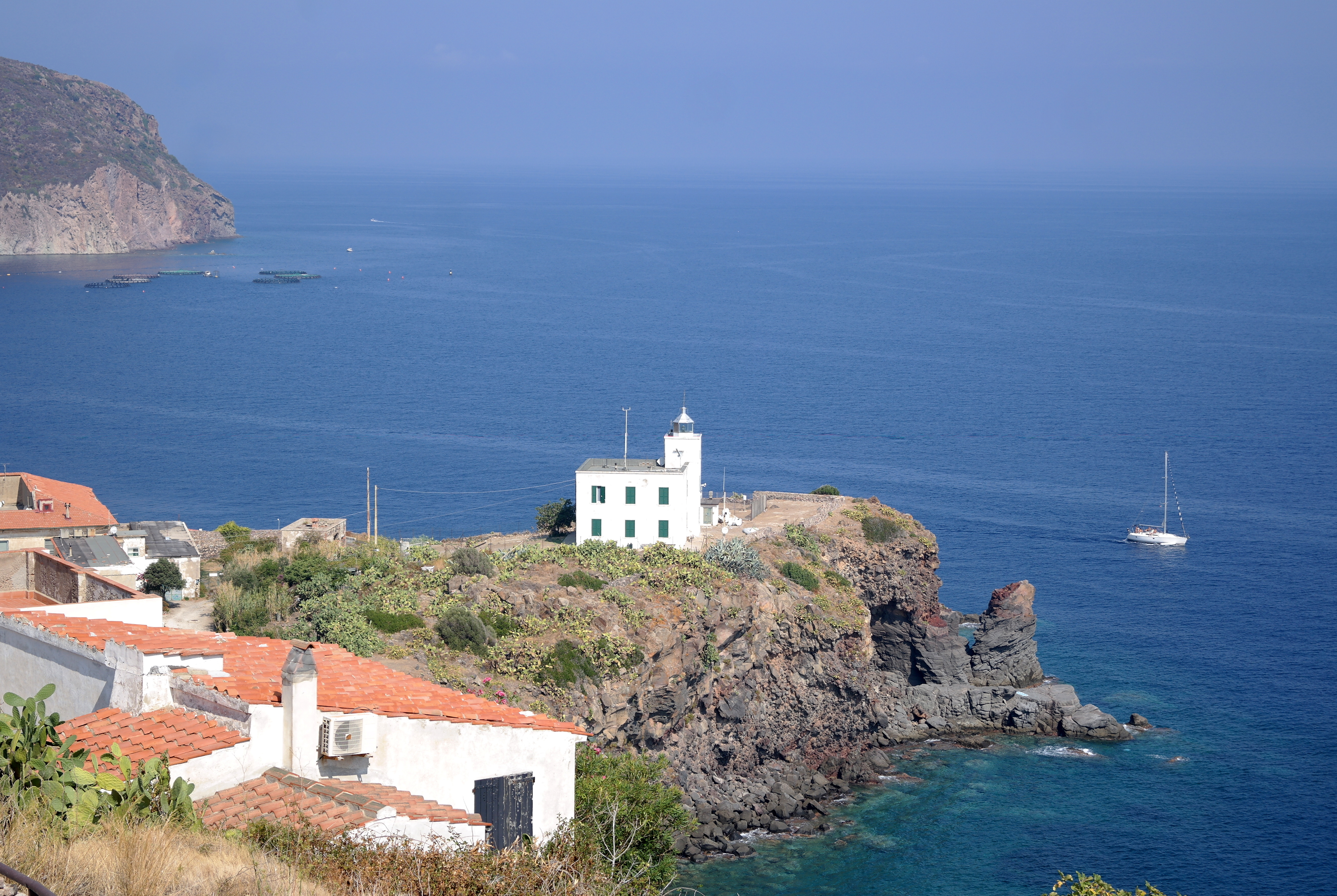 Faro dell'isola di Capraia